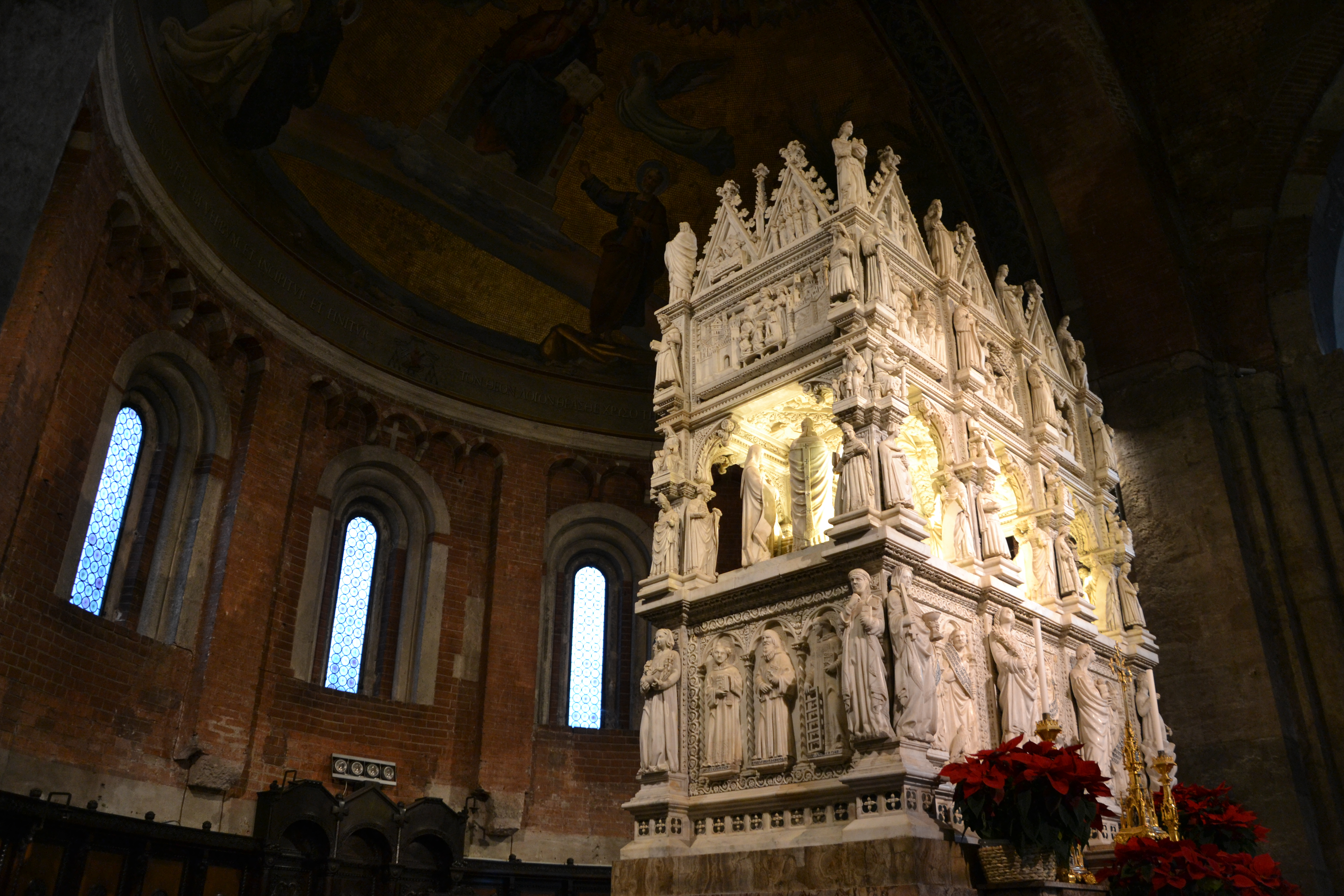 Arca marmorea di S. Agostino, Pavia, S. Pietro in Ciel d'Oro, commissionata nel 1362 da Bonifacio Bottigella, priore del convento degli Eremitani di sant'Agostino, di autori ignoti